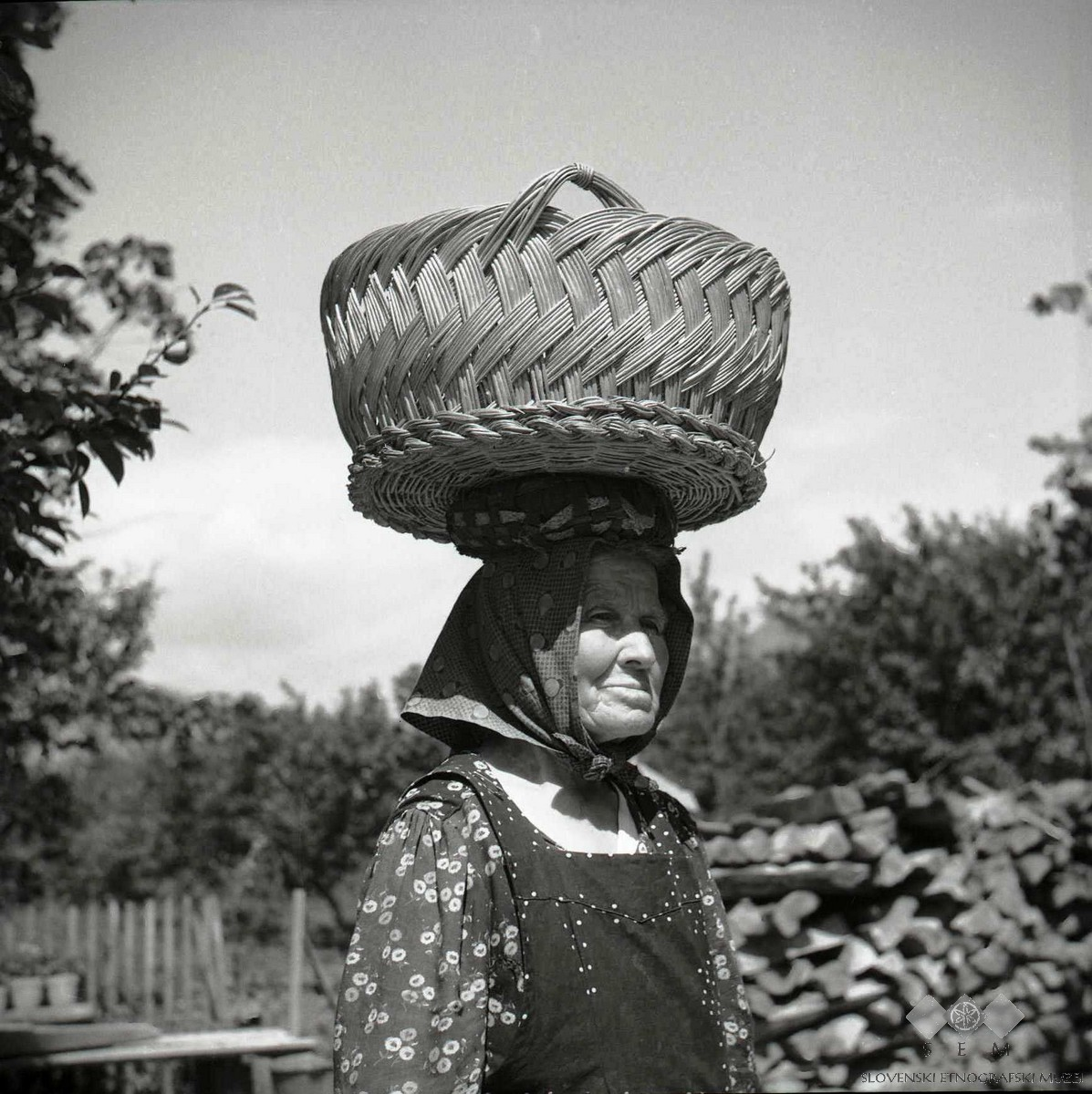 V takem "jerbasu" so ženske z Vipavskega nosile jajca, kokoši in maslo v Trst, razno sadje pa v Idrijo, Cerkno, Logatec in drugam. 75-letna Marija Božič je še pred leti tako nosila sadje naprodaj.